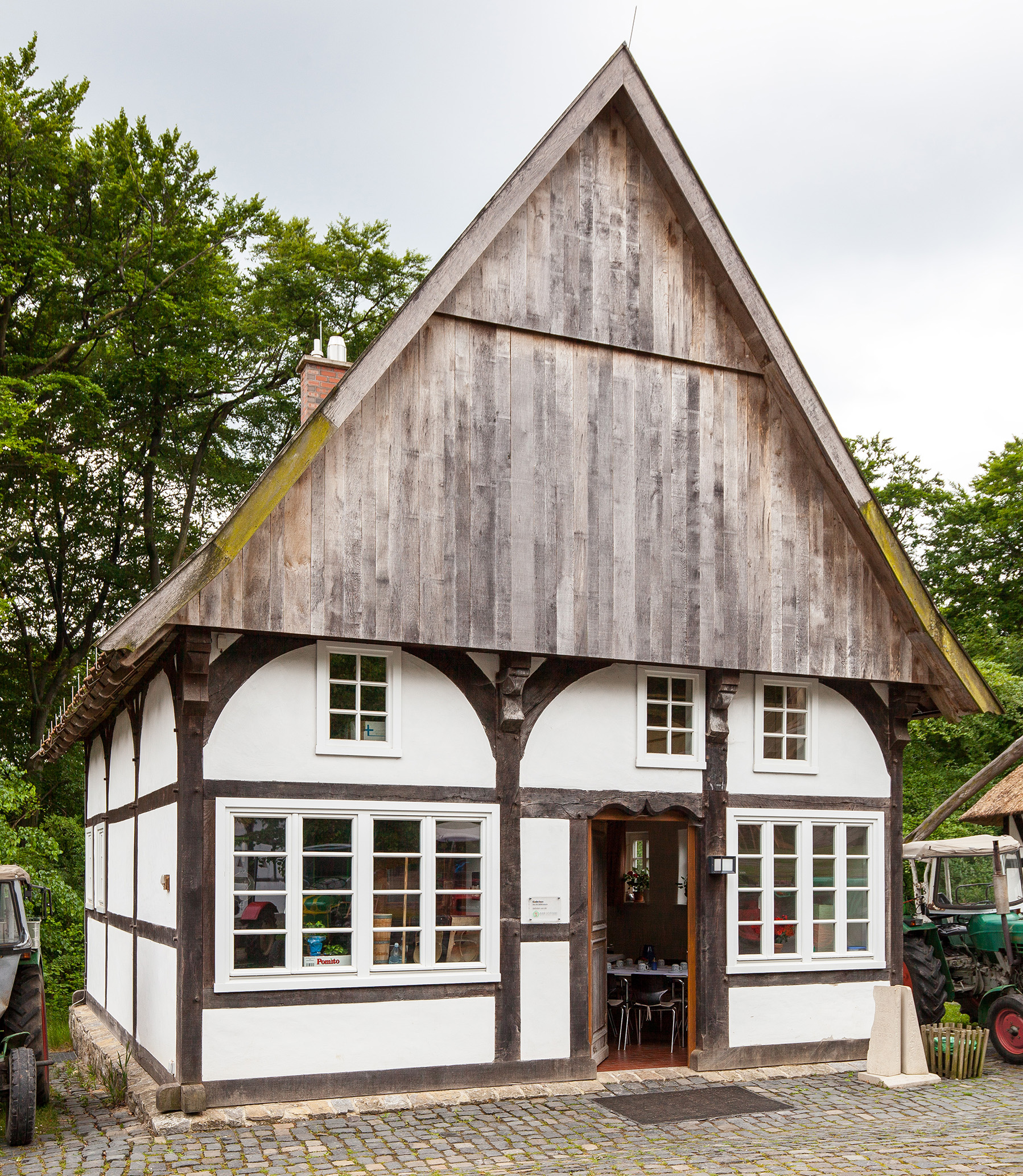 Tagelöhnerhaus von 1568 im Bauernhausmuseum Bielefeld (stand ursprünglich in Vlotho, Lange Str. 32).